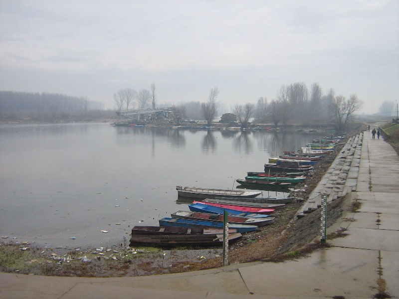 Обала Дунавца код Старог града. Author:JustUser